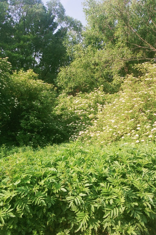 Sambucus nigra & ebulus near Unín, Western Slovakia